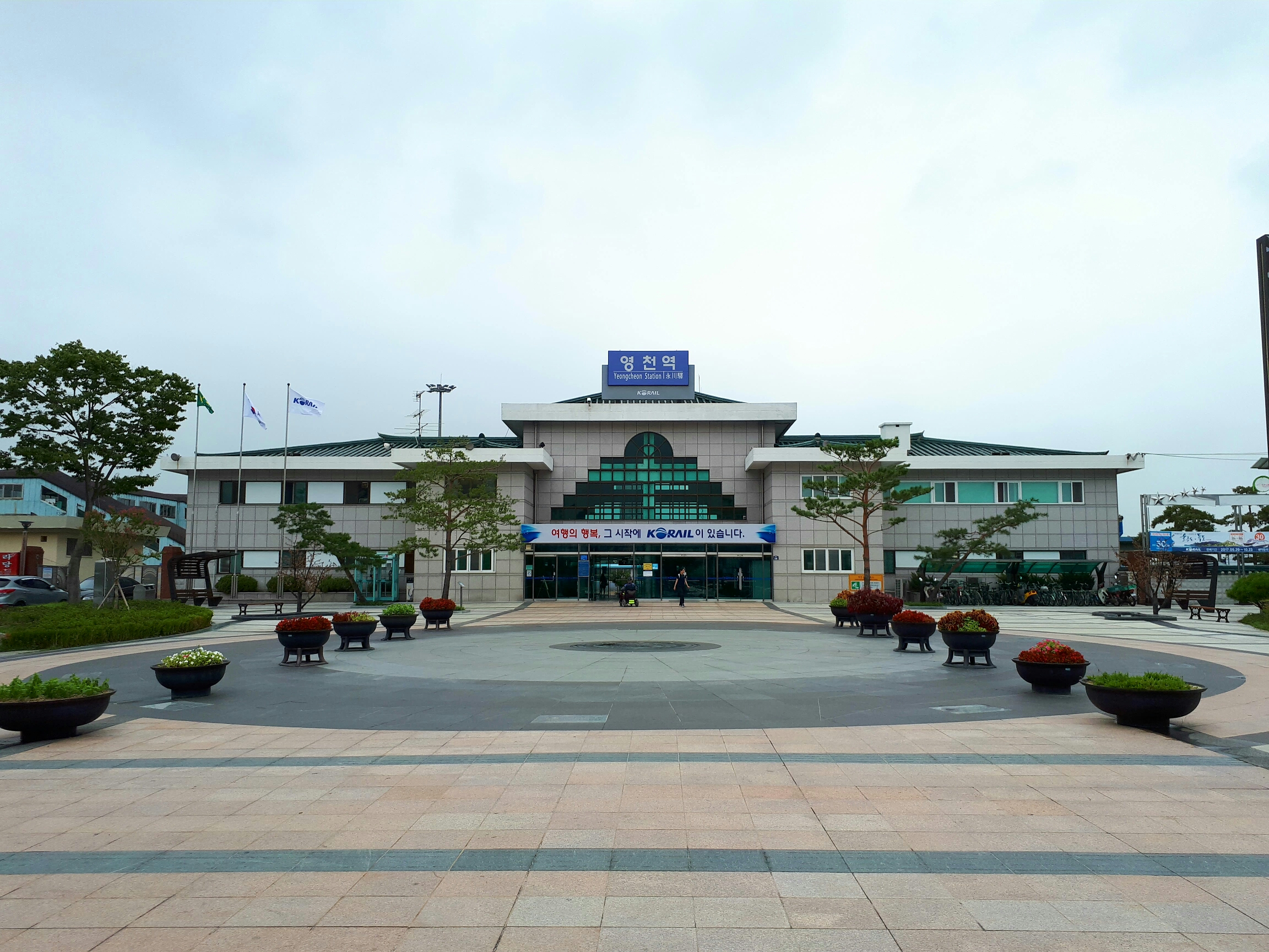 영천역광장 방면에서 바라본 영천역